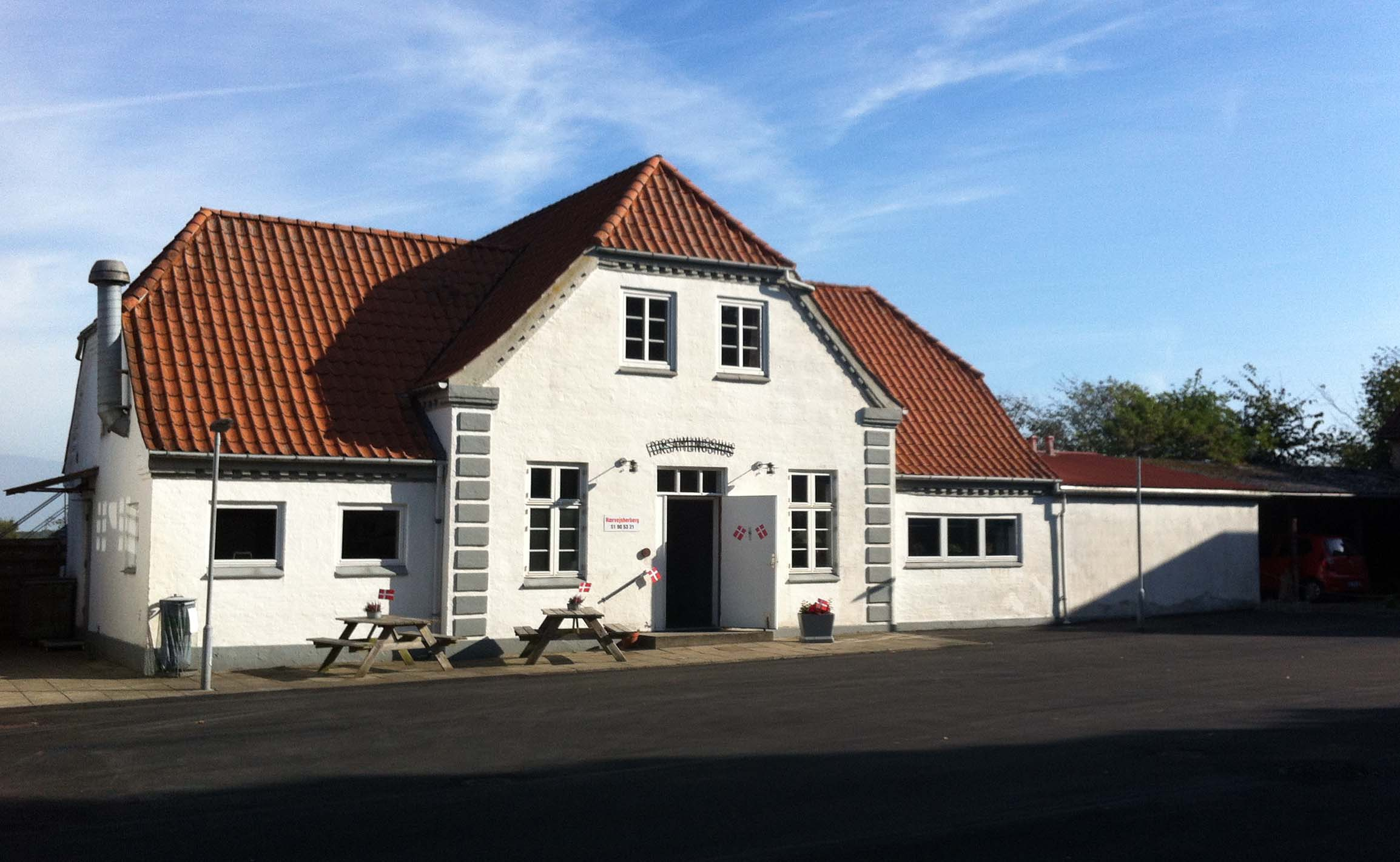 Skivum Forsamlingshus